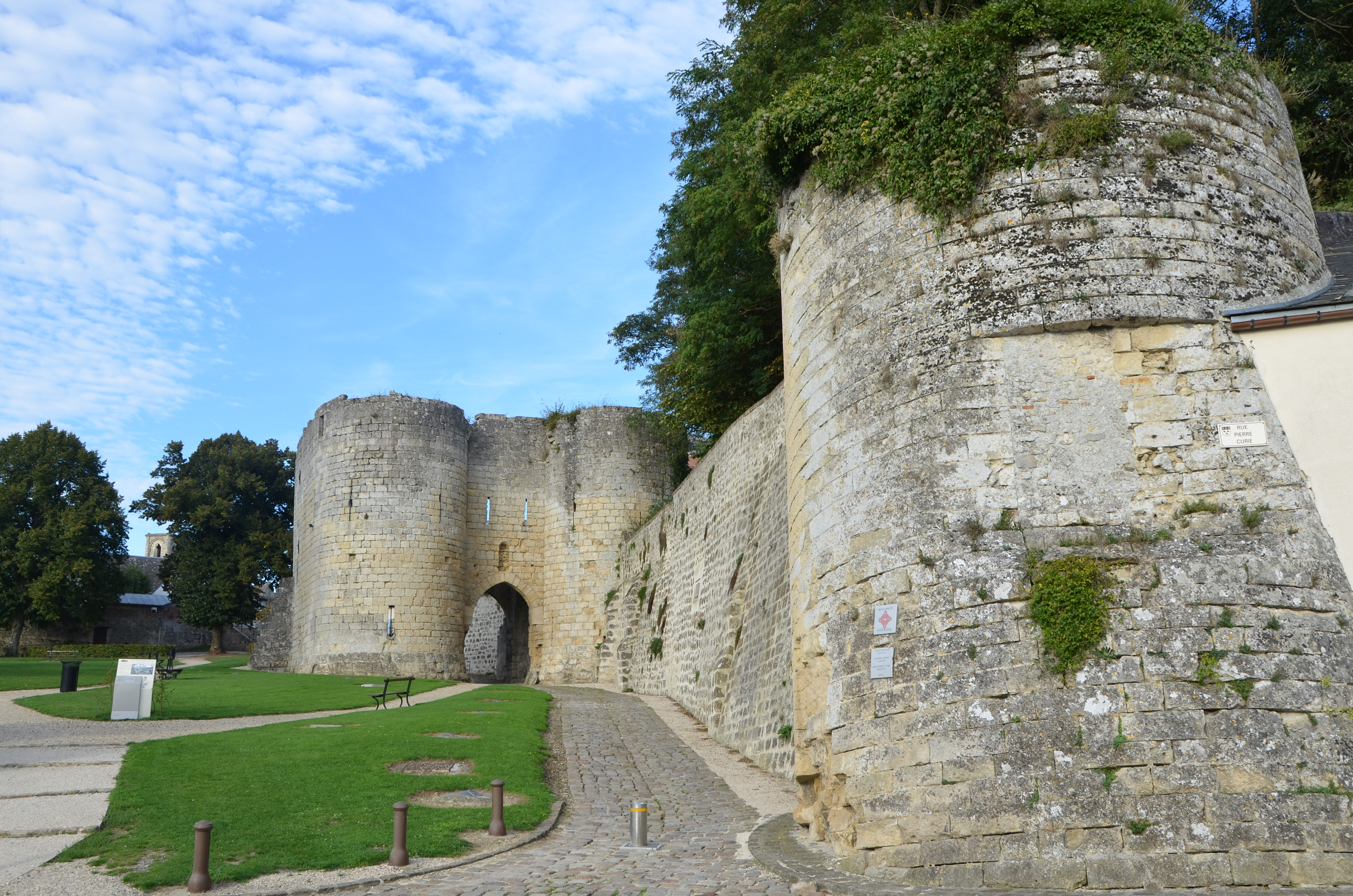 La Tour penchée et la porte de Soissons du système de fortification de Laon, Aisne, France. La Tour penchée est ainsi nommée à cause de sa forte inclinaison qu'elle a pris peu après sa construction.